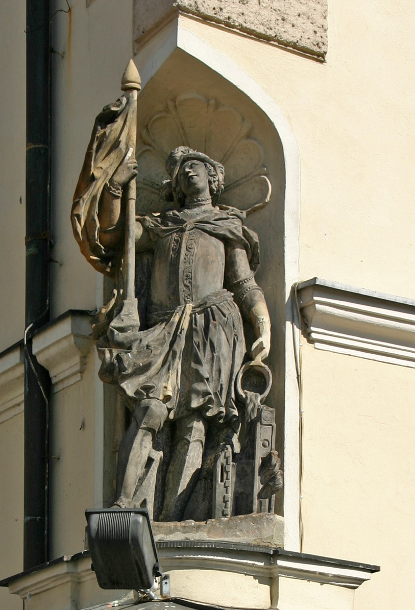 Głogówek (dodatkowa nazwa w j. niem. Oberglogau) – miasto w Polsce położone na Górnym Śląsku, w województwie opolskim, w powiecie prudnickim.